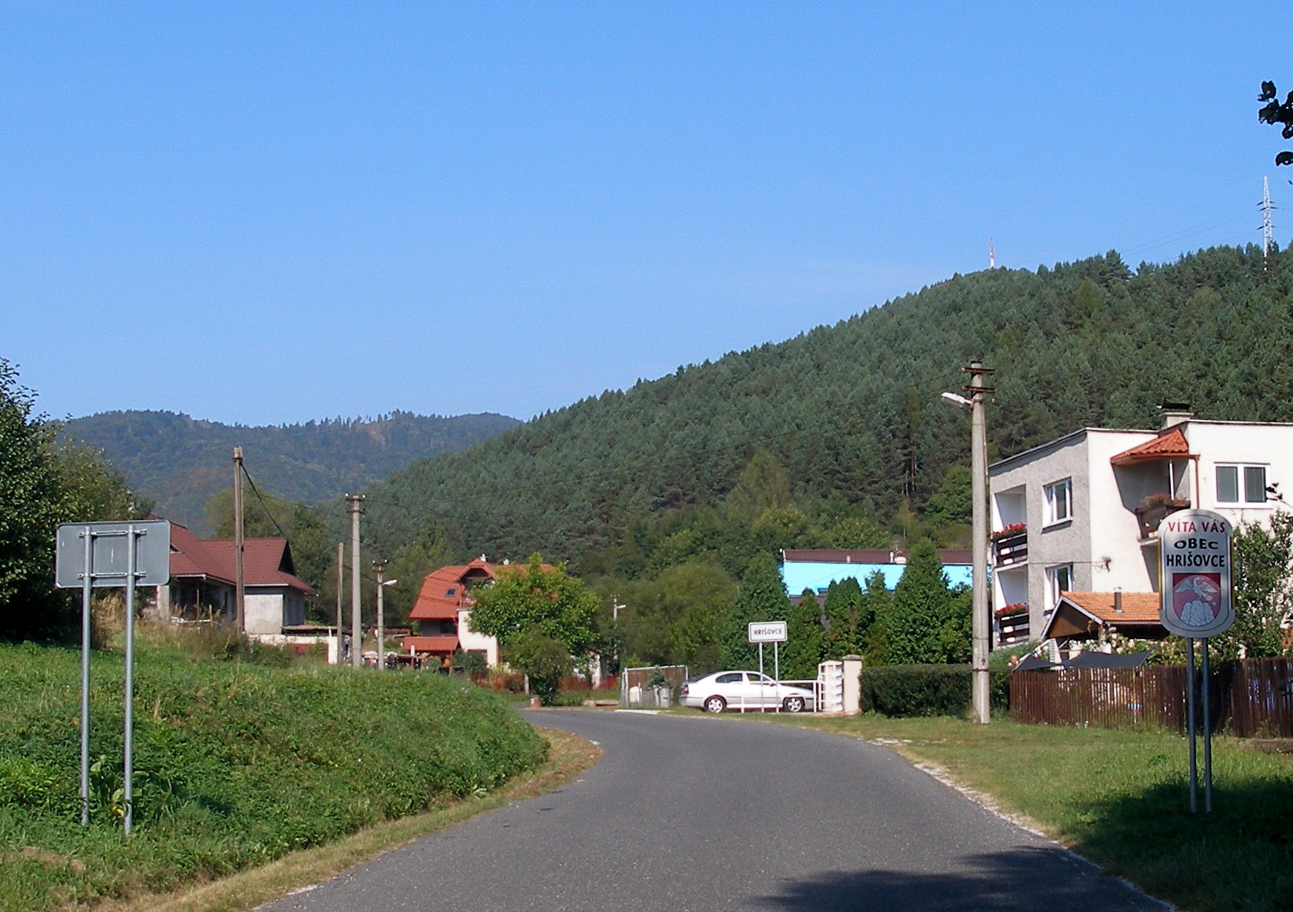 Spišská obec Hrišovce okres Gelnica.